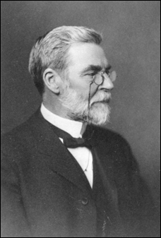 James Law (1838-1921), vétérinaire, fondateur du Cornell University, Cornell Veterinary College (Ithaca, USA), premier vétérinaire professeur d'une université amaricaine